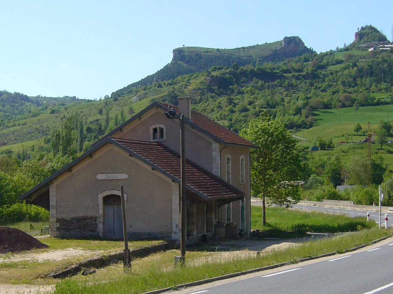 Ancienne Gare SNCF (Barjac, Lozère, France)